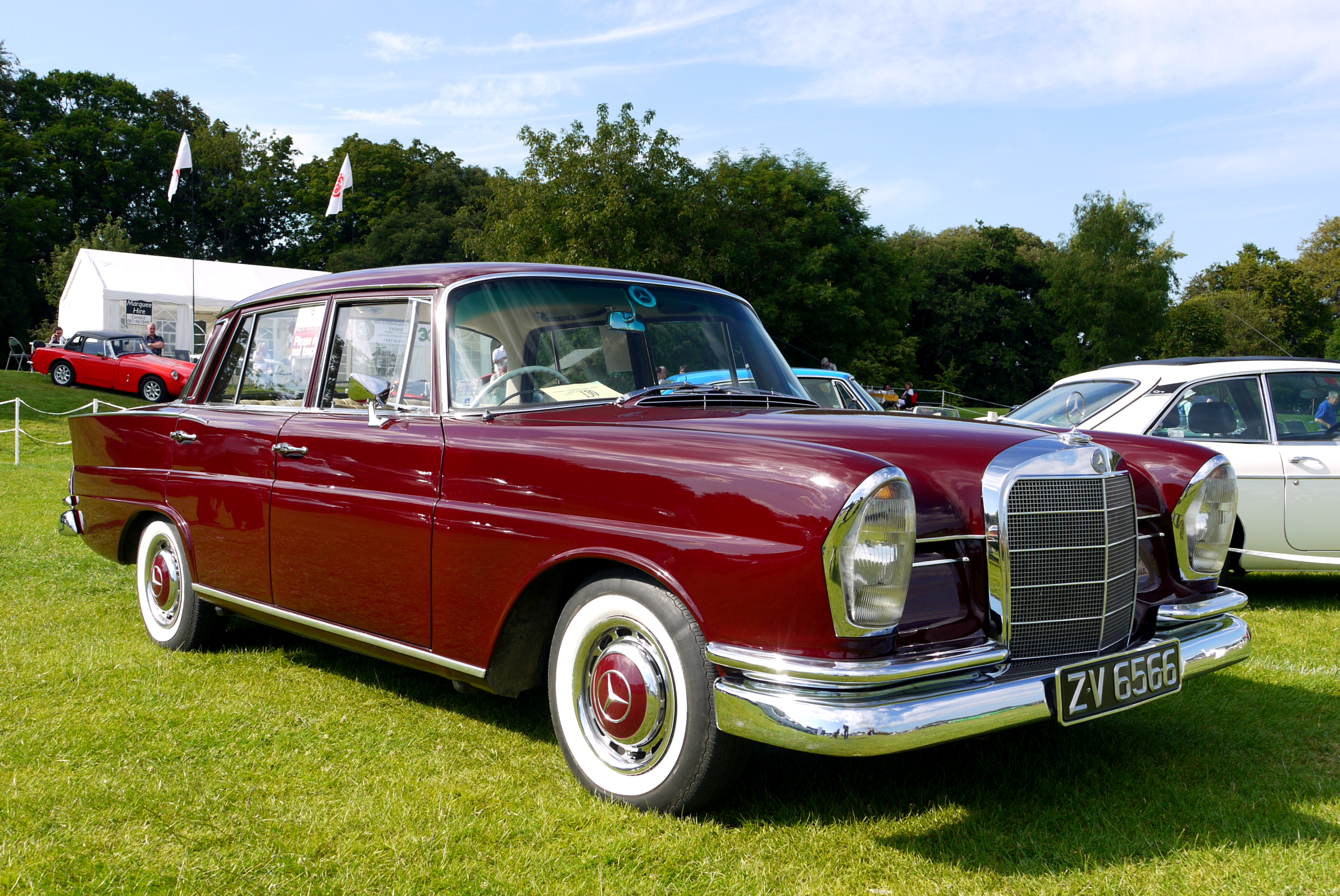 1964 Mercedes Benz 220S Automatic.